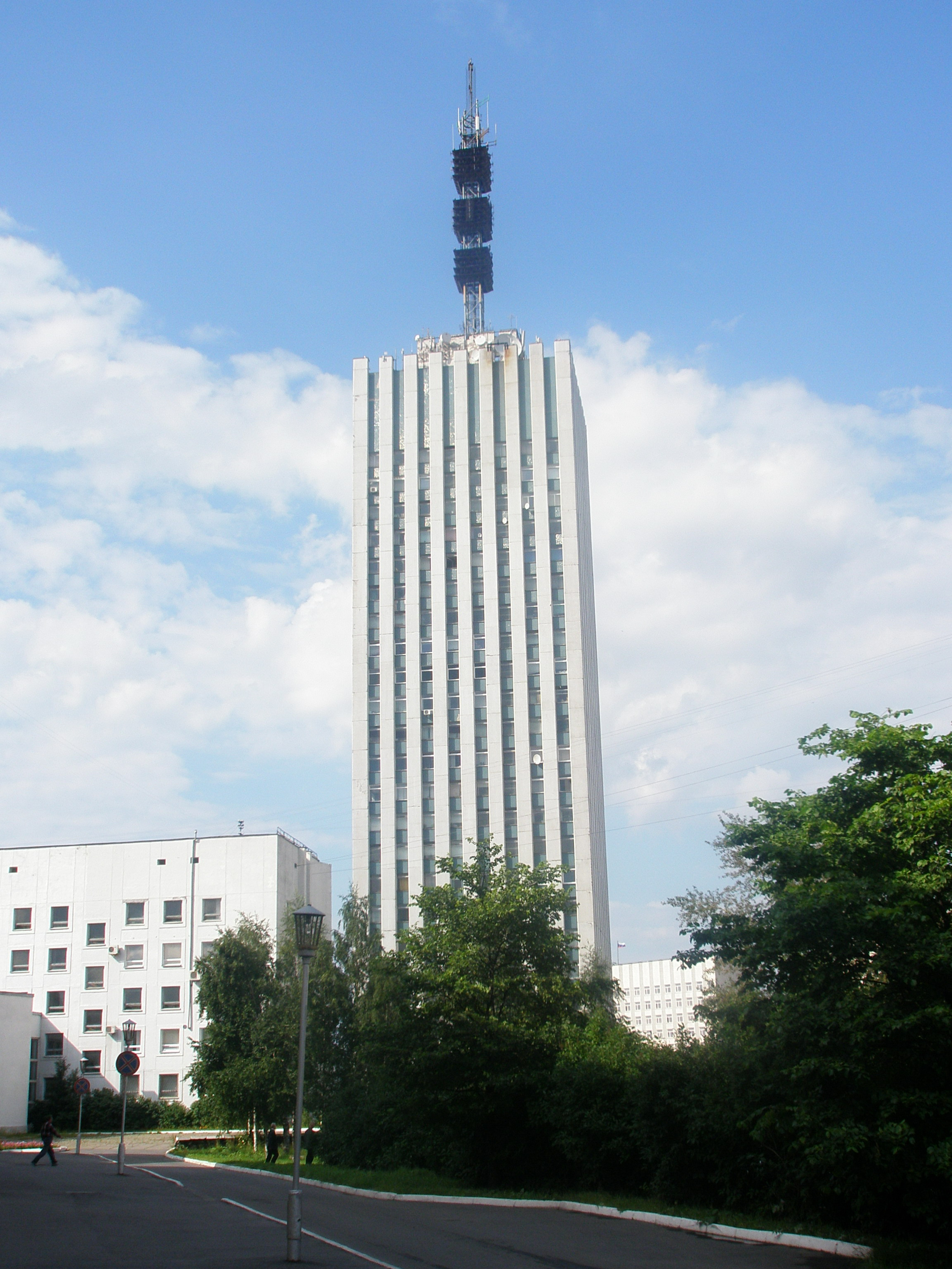 Arkhangelsk tower